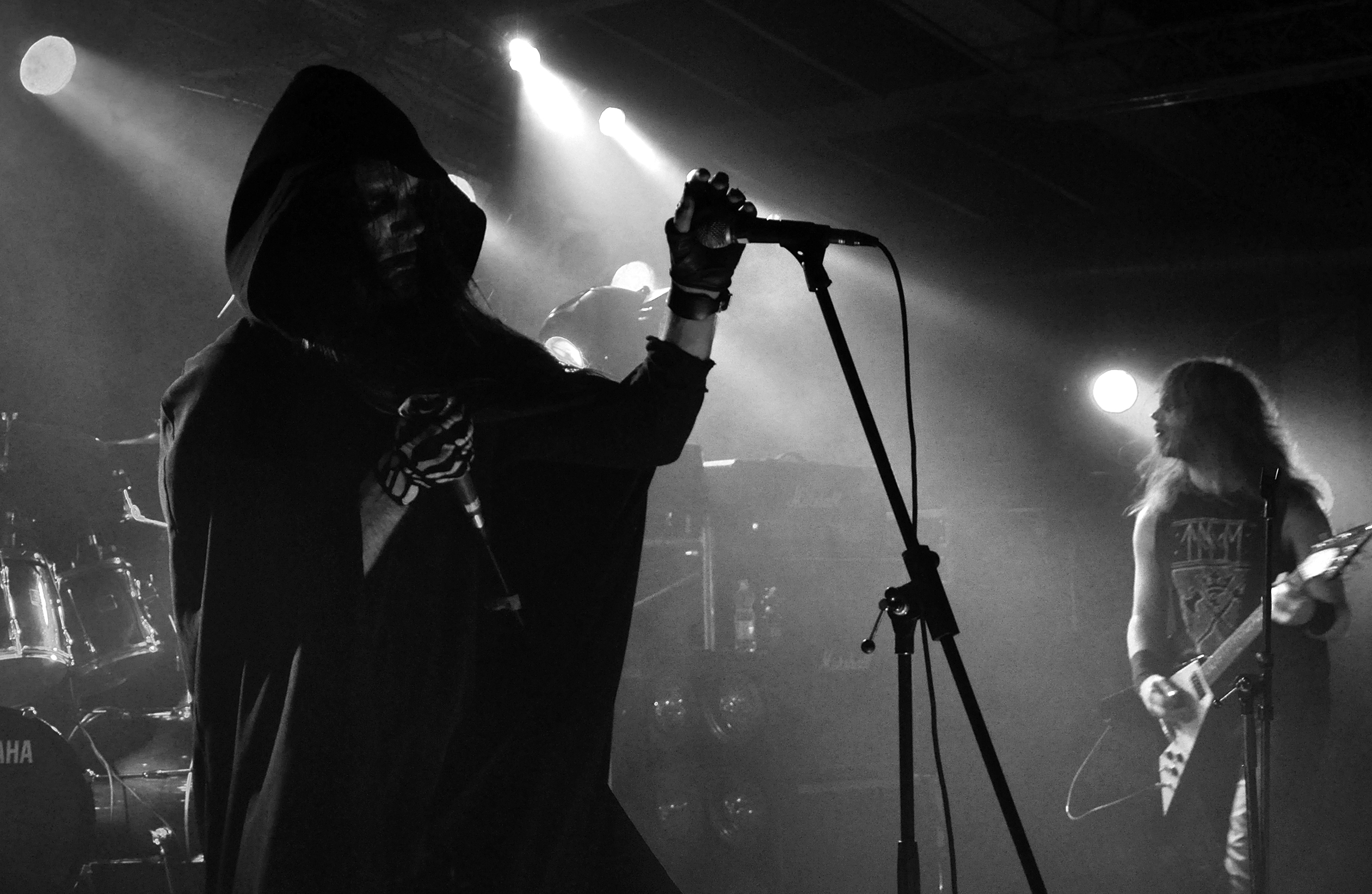 Taake à la Satan's Convention, à Osnabrück (Allemagne), le 3 Décembre 2011.